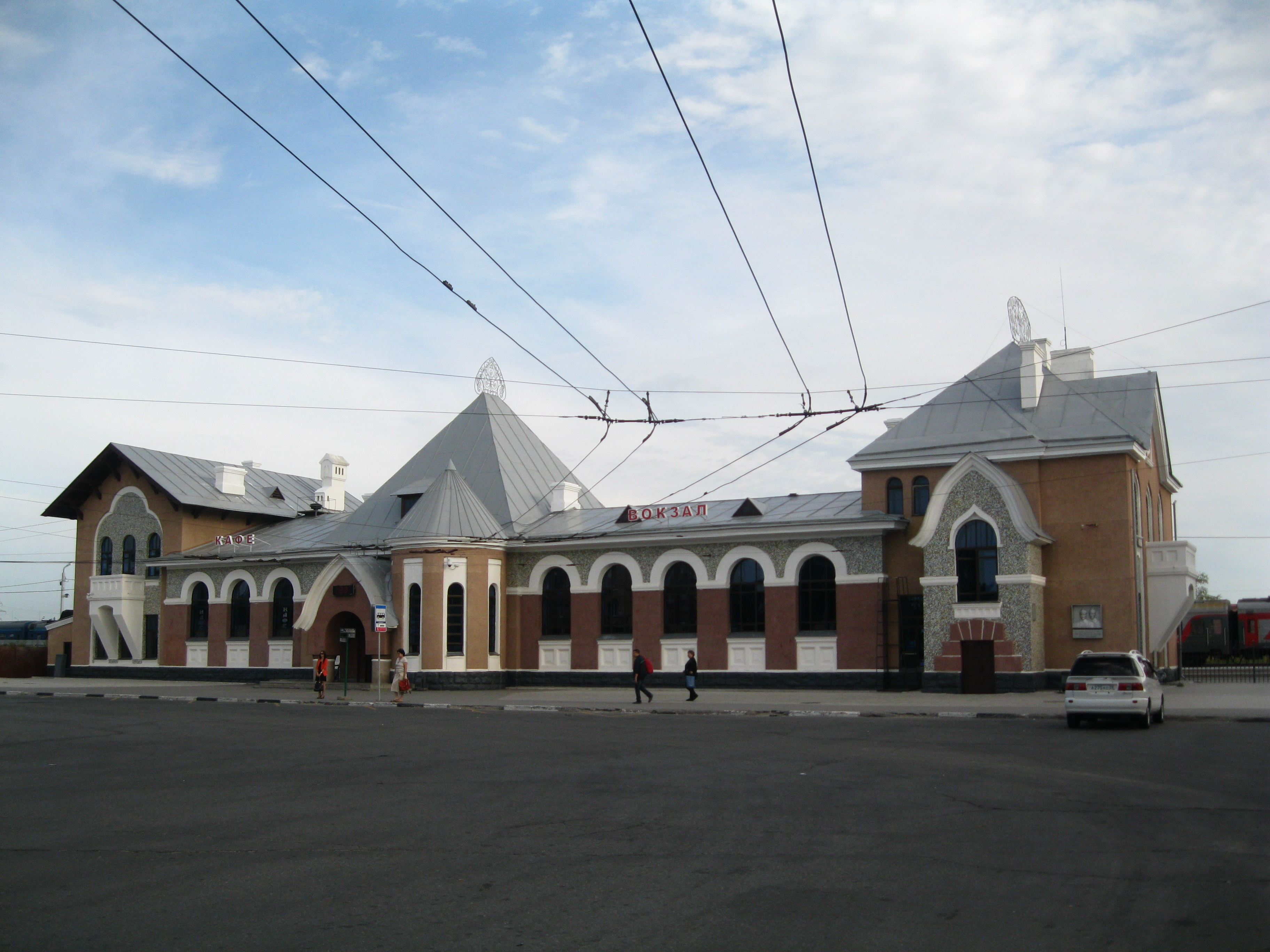 Вокзал станции Благовещенск Забайкальской железной дороги, Благовещенск, Амурская область, Россия